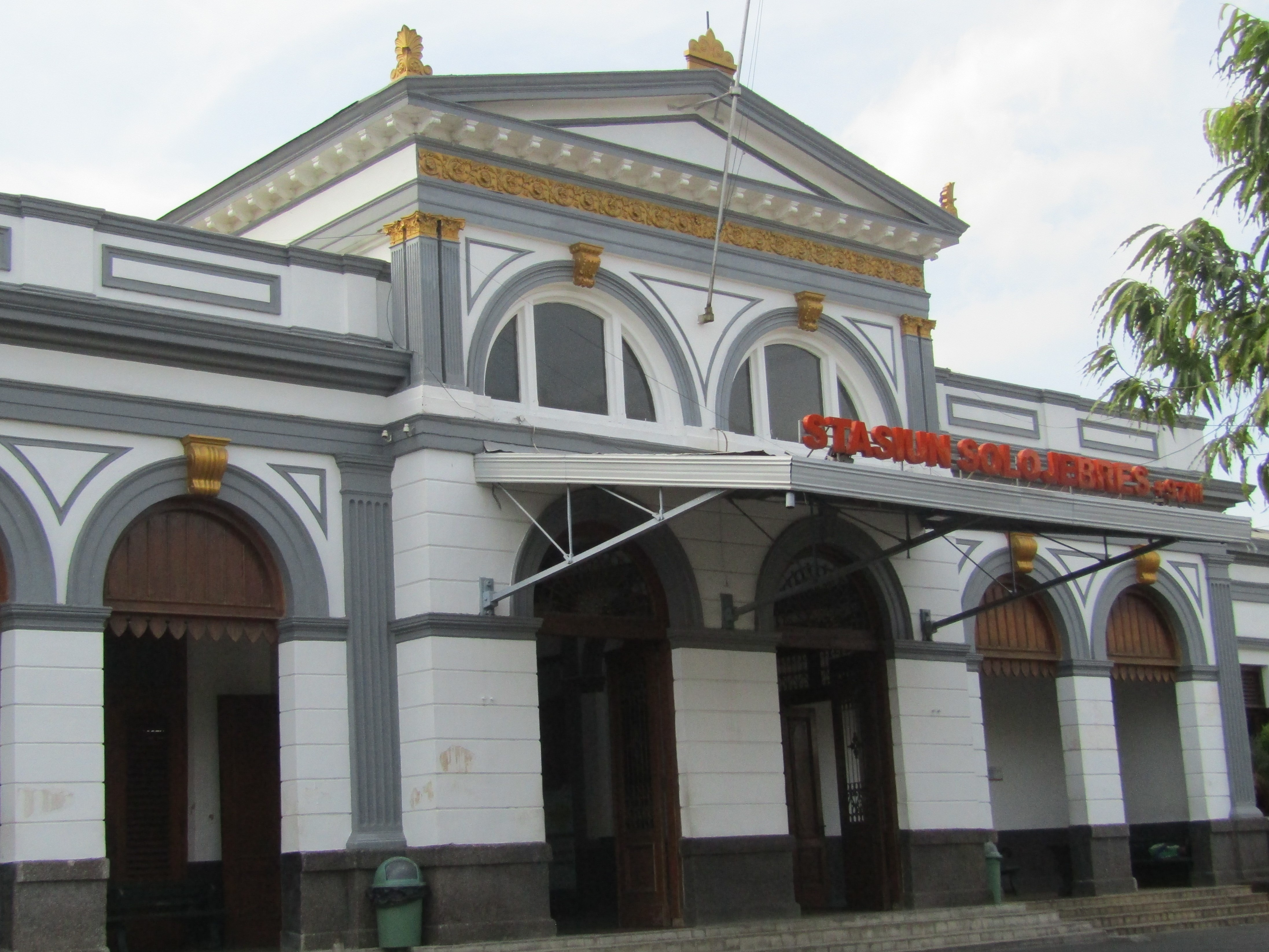 Tampak depan Stasiun Solo Jebres